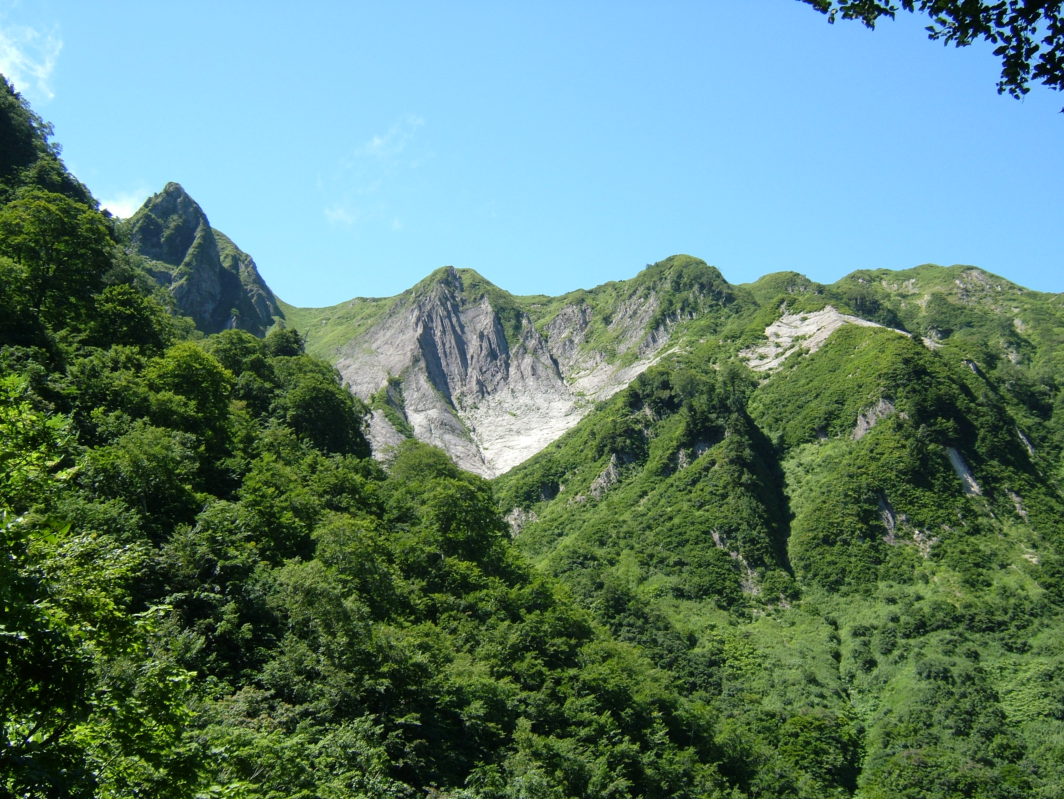 撮影地点 北緯 N36ﾟ53'56.43" 東経 N137゜58'21.09" 標高1490m付近から雨飾山方向、ふとん菱と亀菱と呼ばれる岩肌が見える